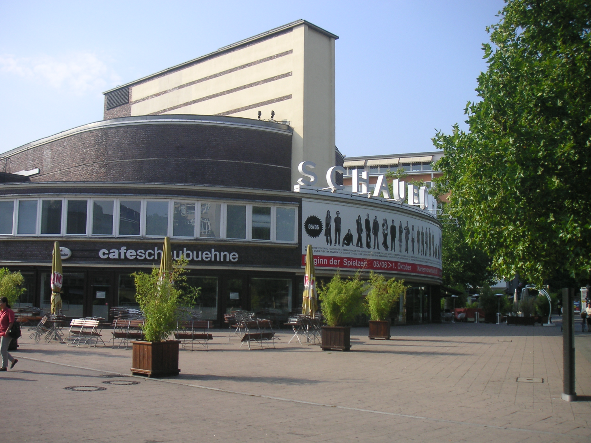 Schaubühne Berlin